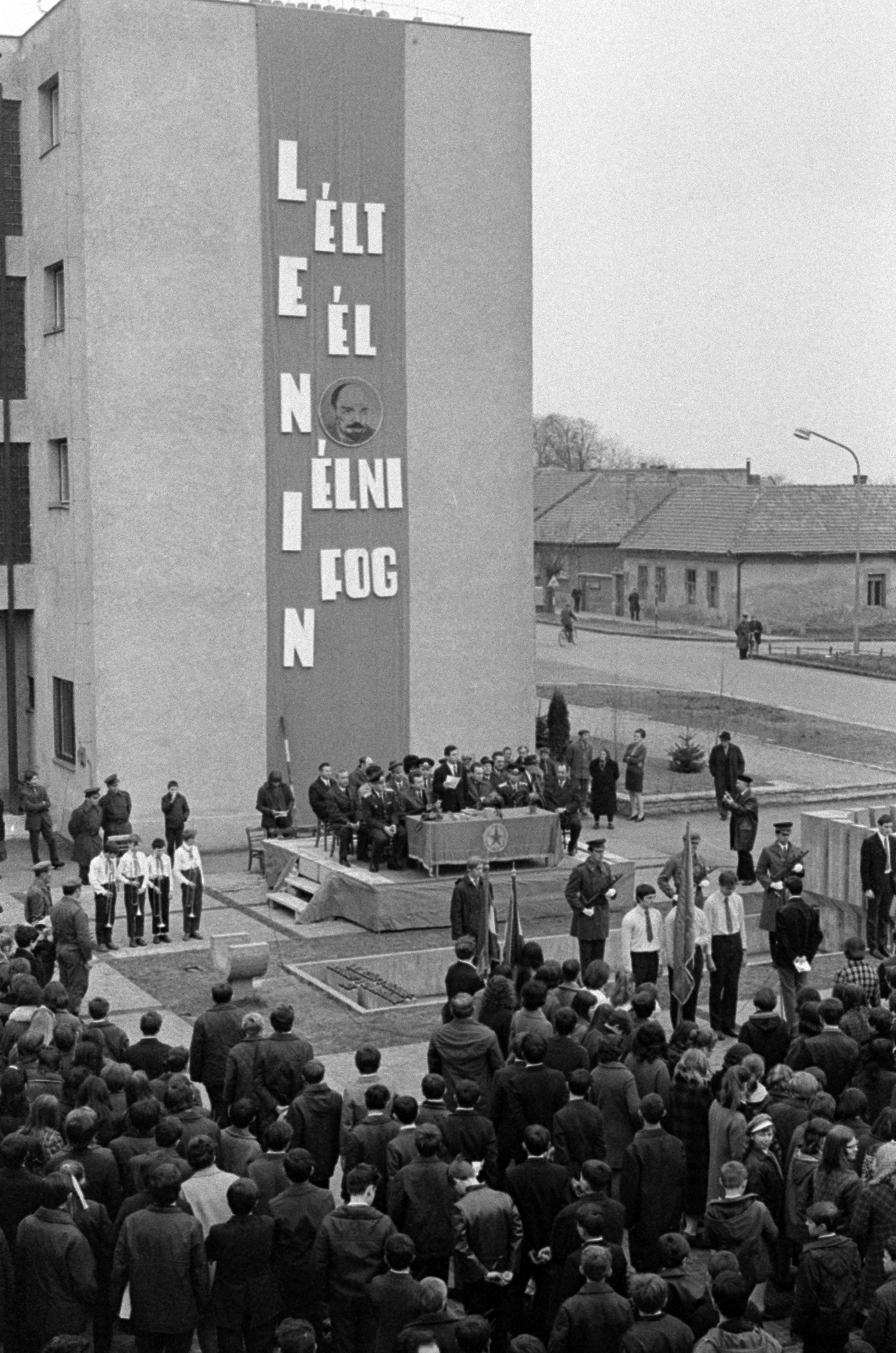 Magyarország Monor Kossuth Lajos utca 88. melletti tér, április 4-i ünnepség, KISZ-tagok fogadalomtétele.